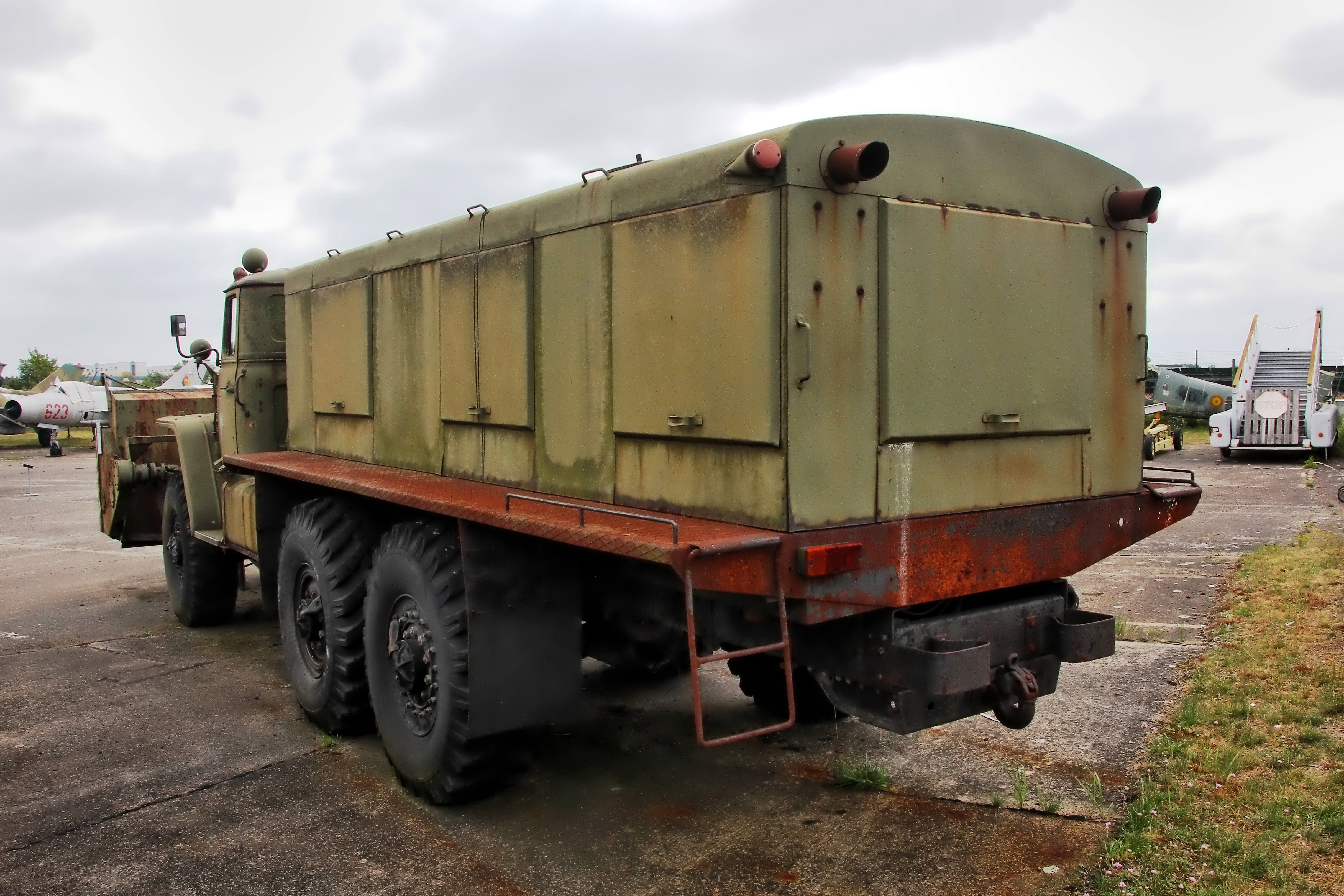 Schneefräse D-902 auf Ural-375E im Luftfahrttechnischen Museum Rothenburg, Heckansicht.